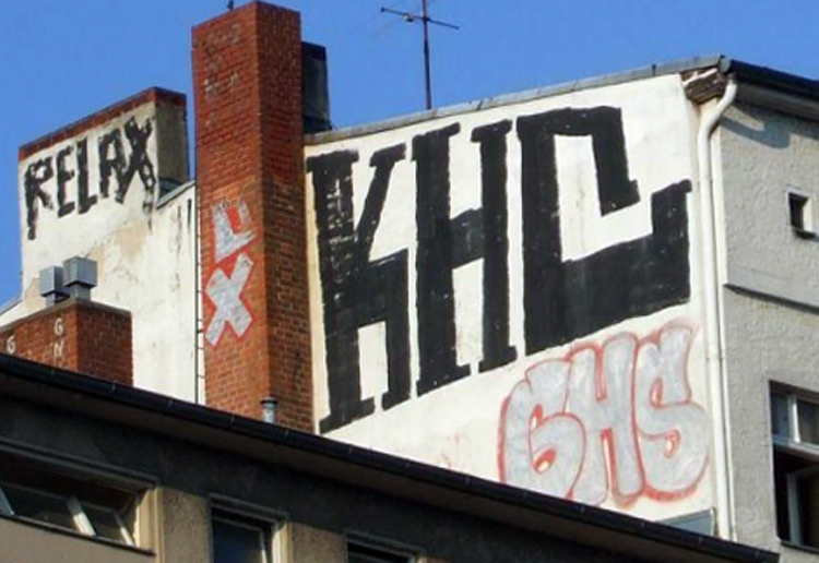 Rooftop von GHS in Berlin sowie Streichbombing von KHC